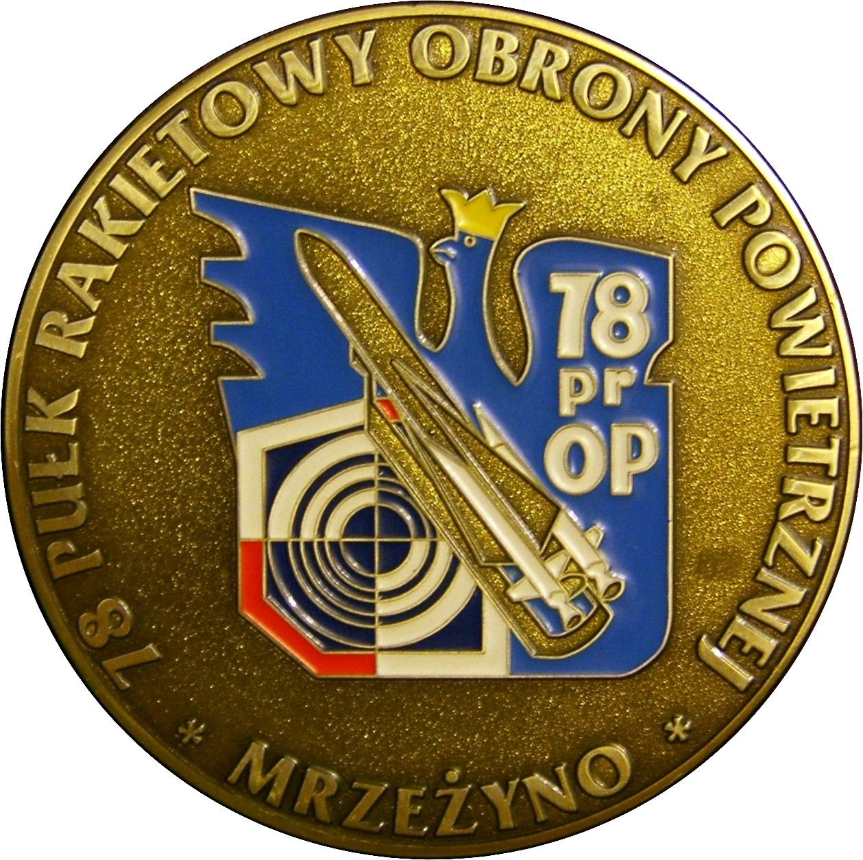 Medialion z pamiątki nadania sztandaru dla 78. Pułku Rakietowego Obrony Powietrznej Kraju w Mrzeżynia z dnia 27 września 2003